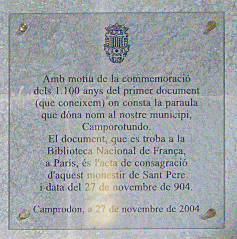 Placa commemorativa, monestir Sant Pere, Camprodon (Ripollès, Girona, Catalunya, Espanya)